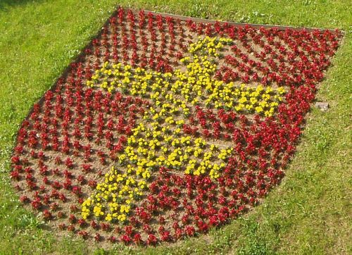 Esslingen am Neckar - Berkheim - Blumenbeet Wappen